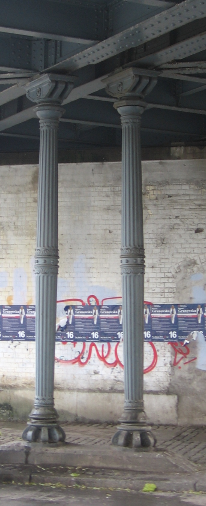 Filary Hartunga pod wiaduktem kolejowym we Wrocławiu, ul. Stysia.